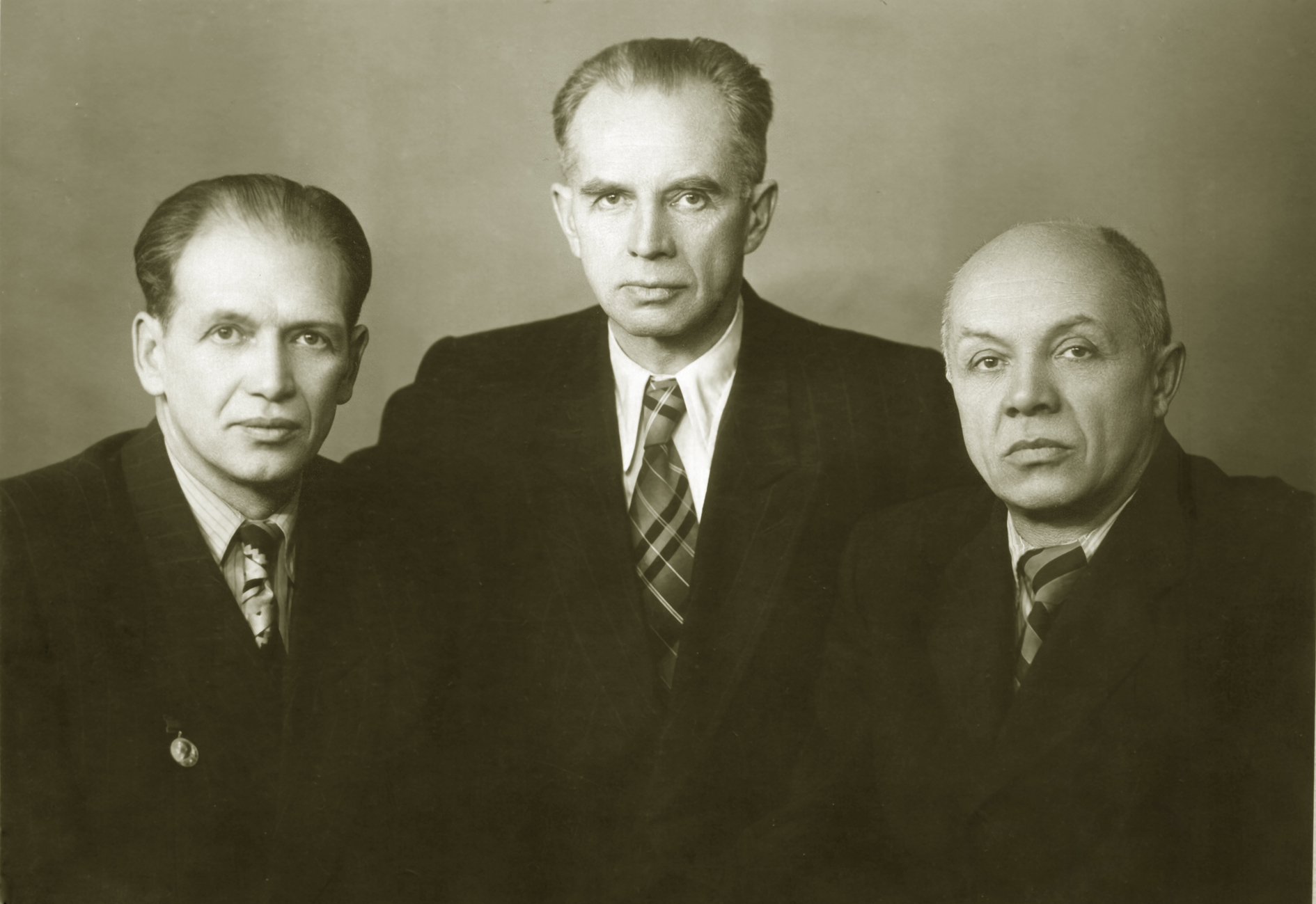 Борис Львович Кербер (справа) с братьями: Виктором (в центре) и Леонидом